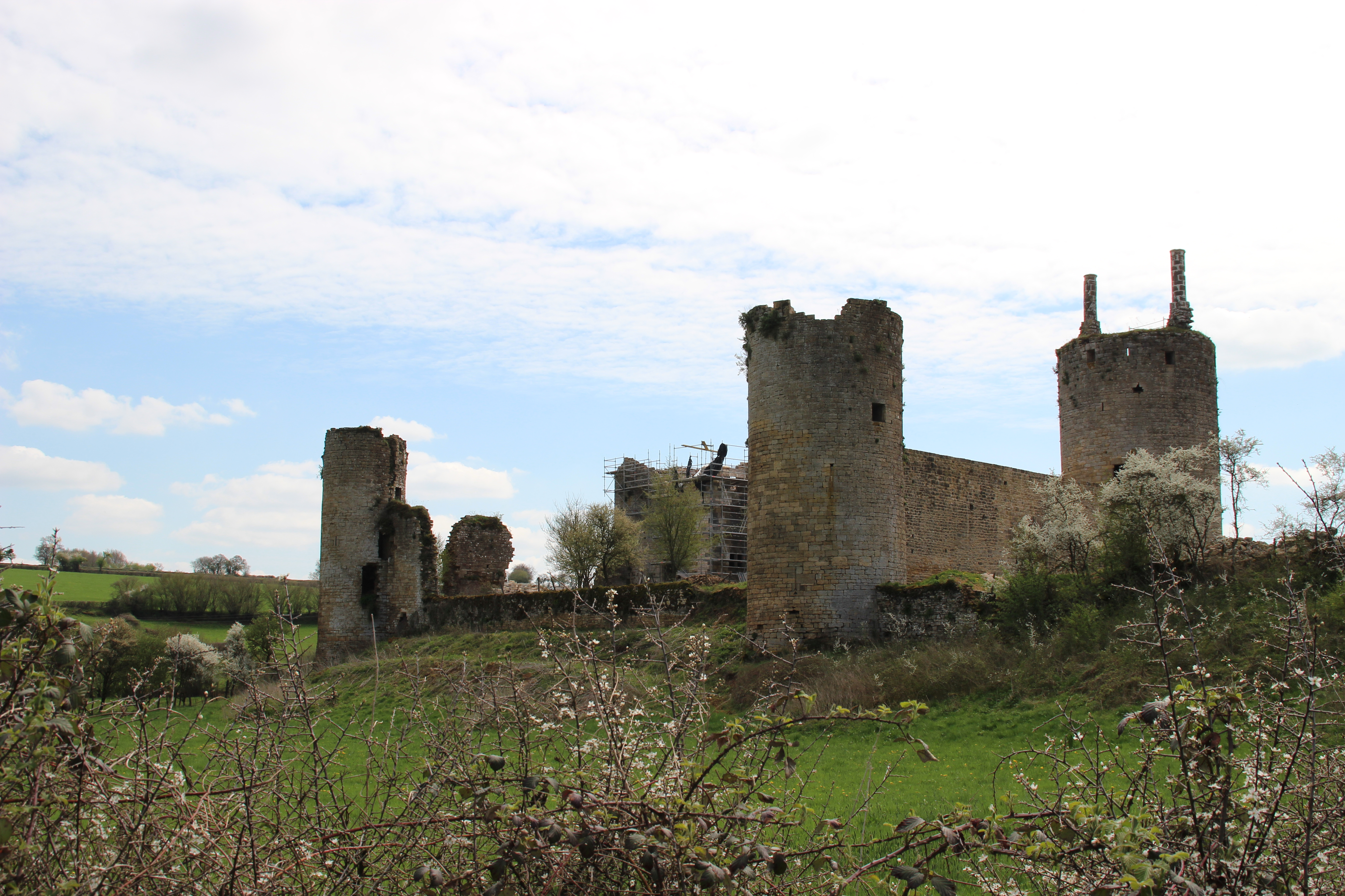 Château de Commune